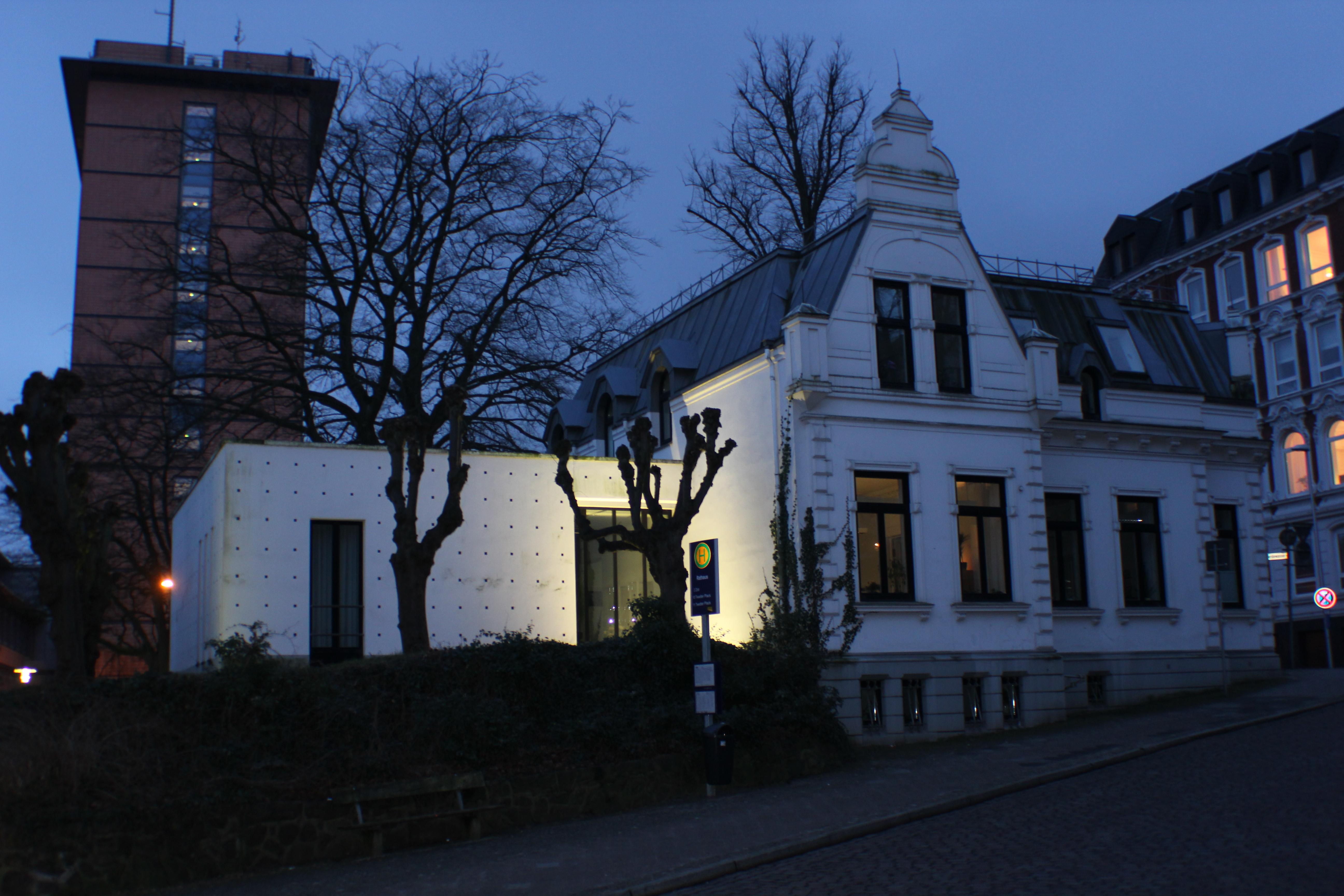 Besenbruchbude mit dem Rathaus dahinter bei Nacht (Flensburg 2014)